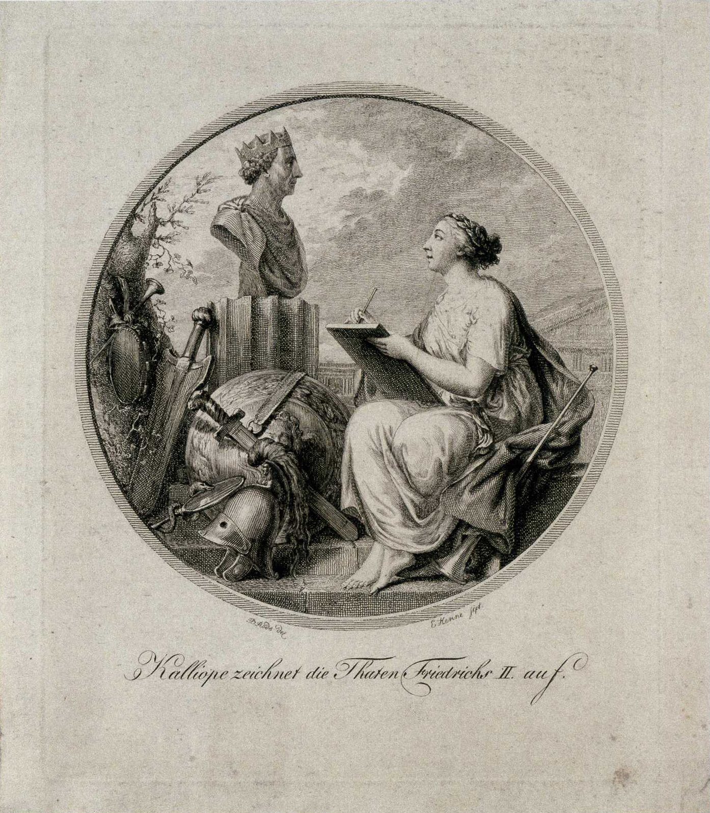 Kalliope zeichnet die Thaten Friedrichs II. auf. Radierung, Stiftung Preußische Schlösser und Gärten, GK II (10) 1368